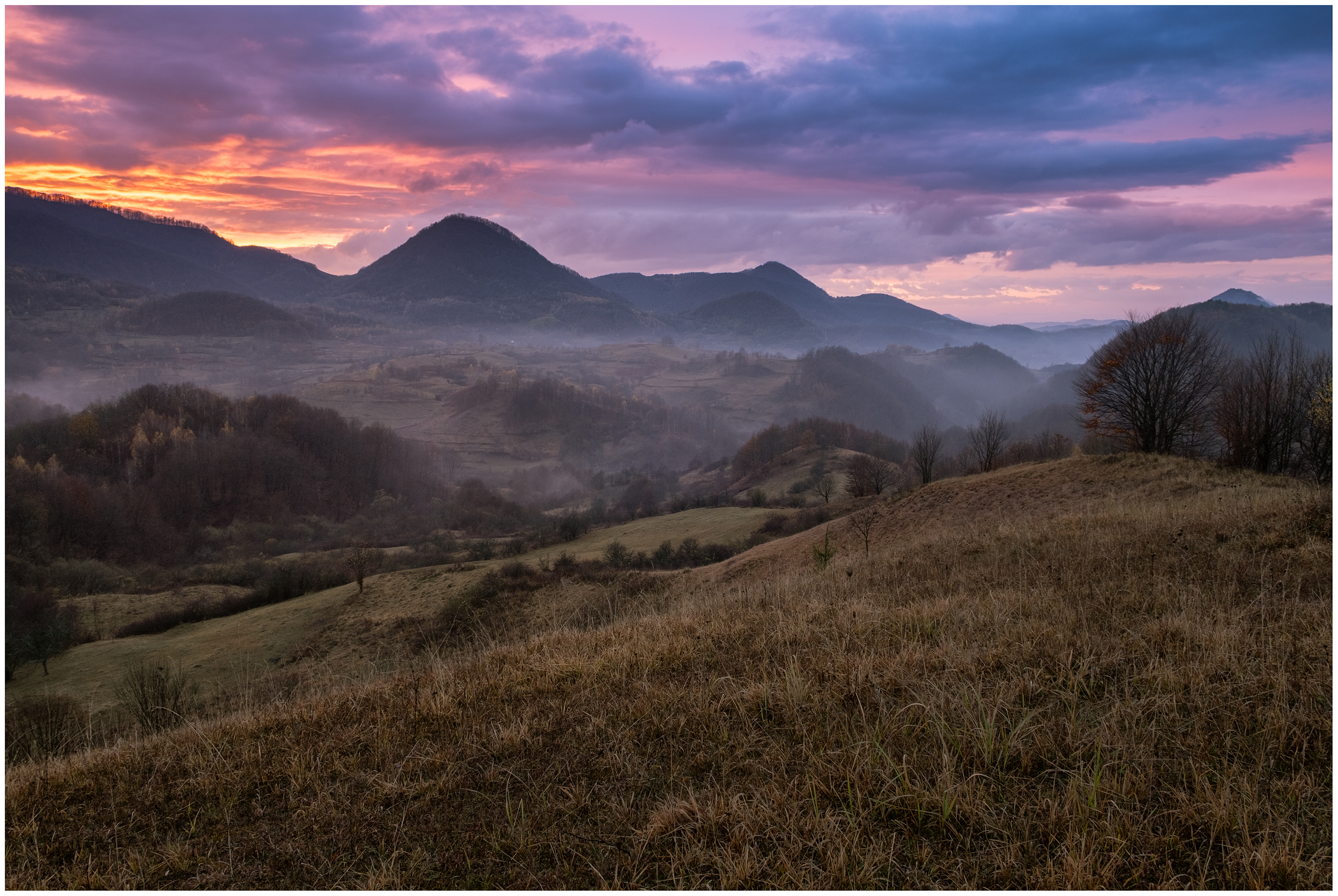 Muntii Metaliferi , Carpatii Occidentali , Romania